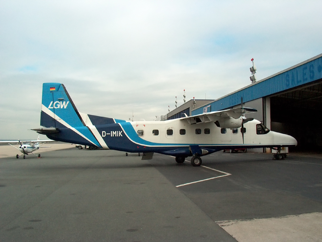 Aircraft: Dornier Do 228-200 Airline: Luftfahrtgesellschaft Walter mbH (LGW) Registration: D-IMIK Location: Dortmund Airport, Germany